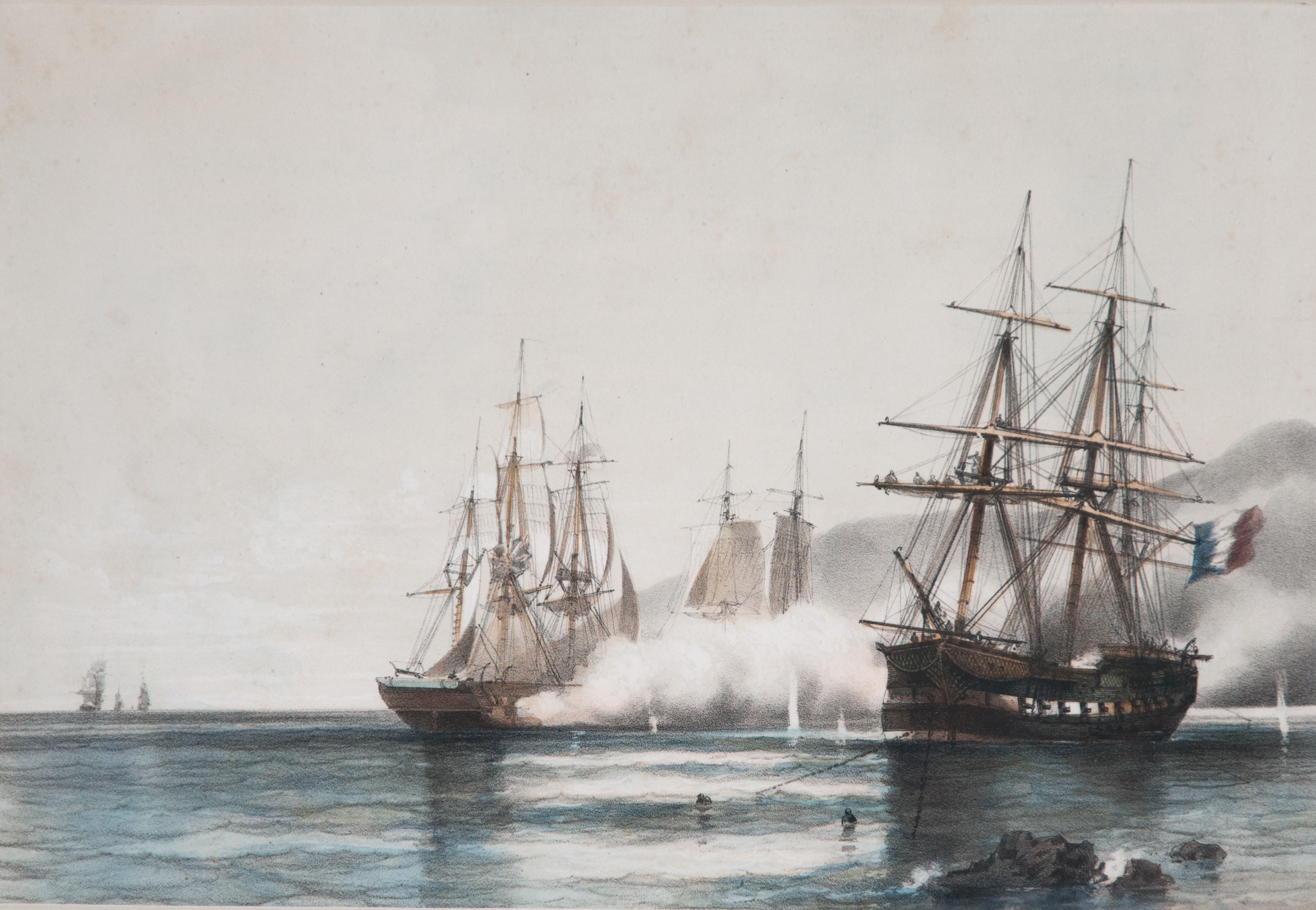 Vista que representa el enfrentamiento producido el 20 de noviembre de 1845 de las fuerzas argentinas -en inferioridad de condiciones- contra la escuadra anglo-francesa, para impedir su paso hacia el norte del Río Paraná, defendiendo la soberanía argentina.